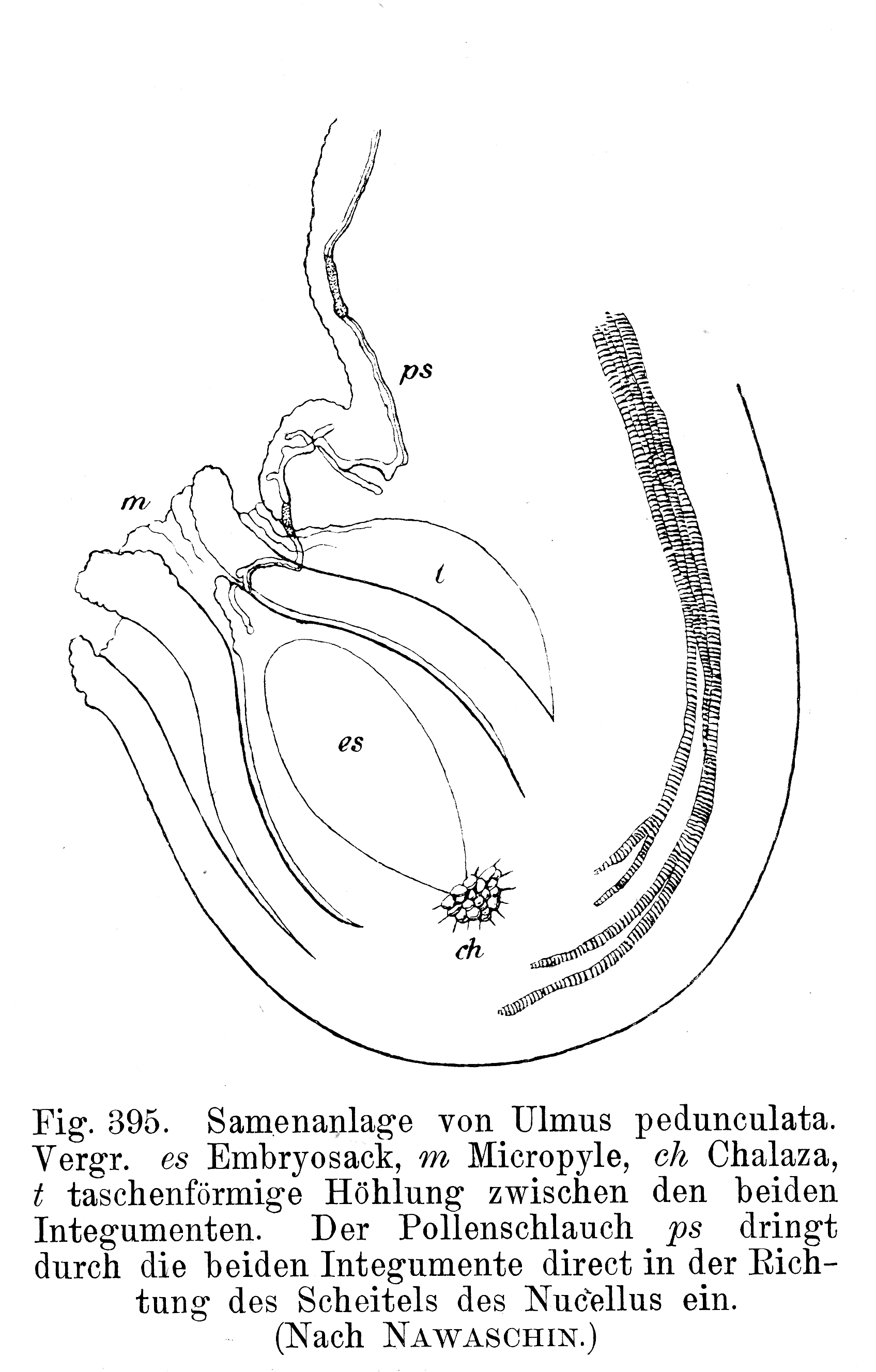 ovule of Ulmus / Samenanlage von Ulmus